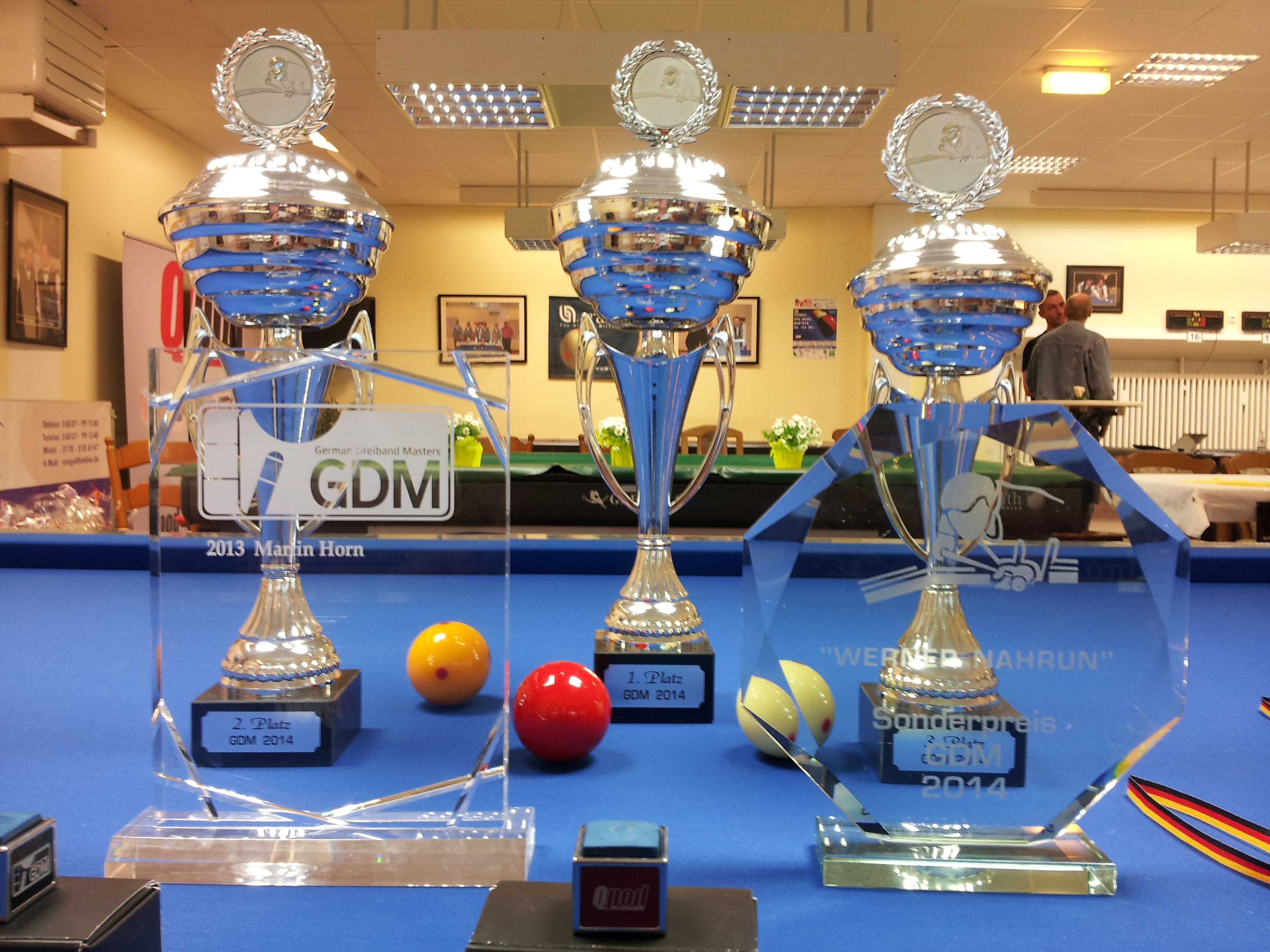 Pokale der German Dreiband Masters 2014.